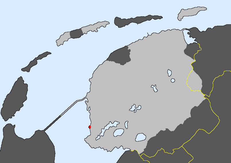 Taalgebiet fan it Hylpersk